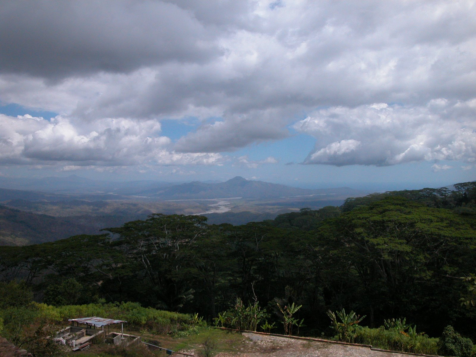 Fazenda Algarve, Distrikt Liquiçá